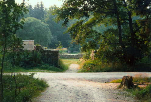 Porta Decumana des Kastells Kleiner Feldberg